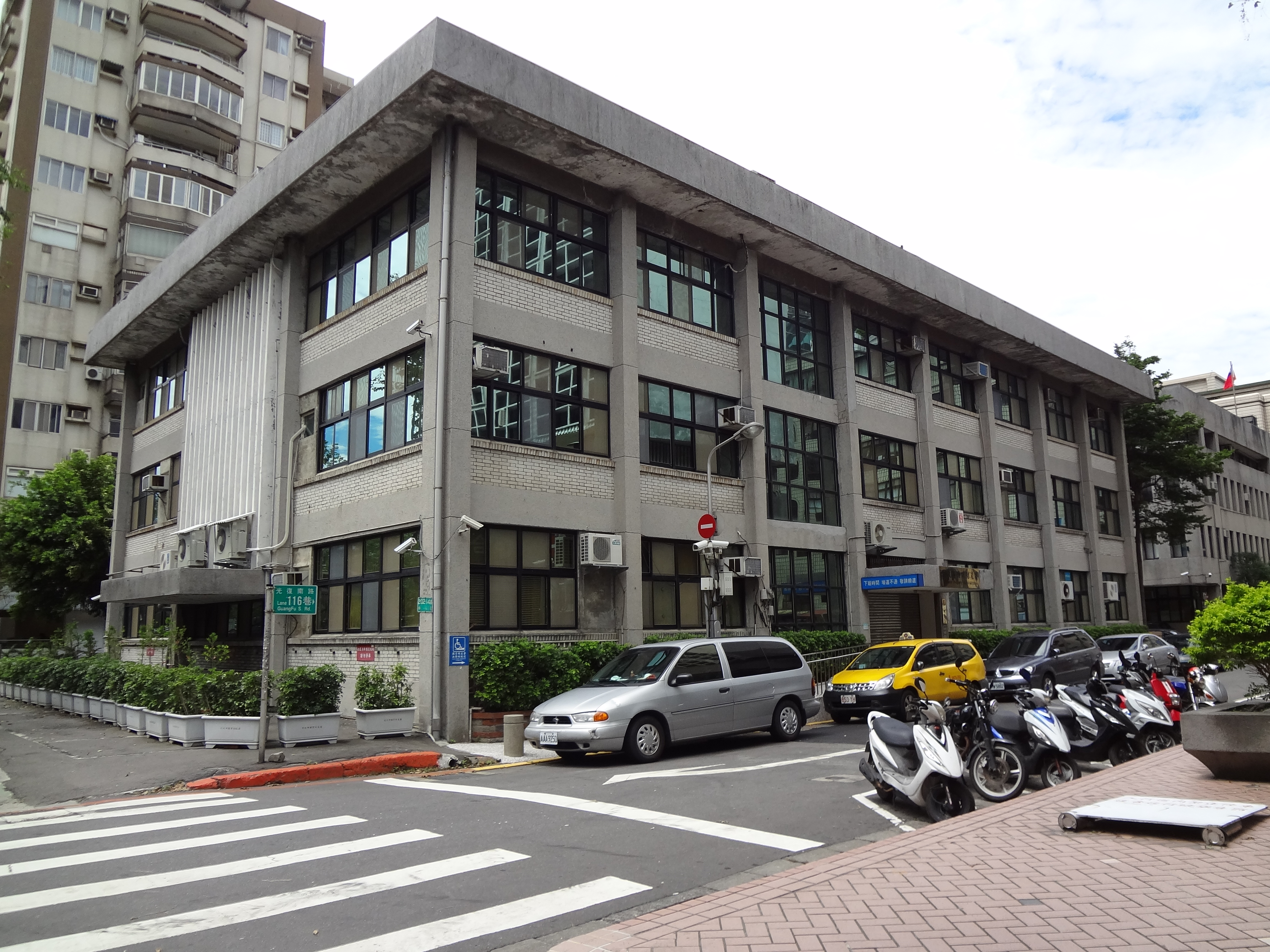 中華民國財政部國有財產署第二辦公室，地址：臺北市大安區光復南路148號。